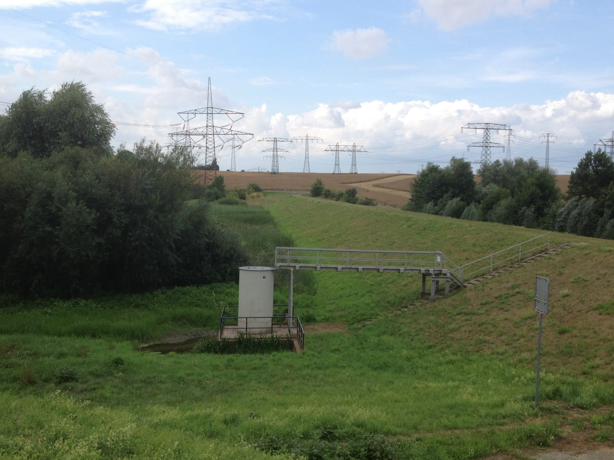 Hochwasserschutzanlage Schrotestau bei Magdeburg-Diesdorf